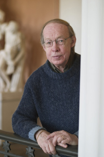 Oma kuva